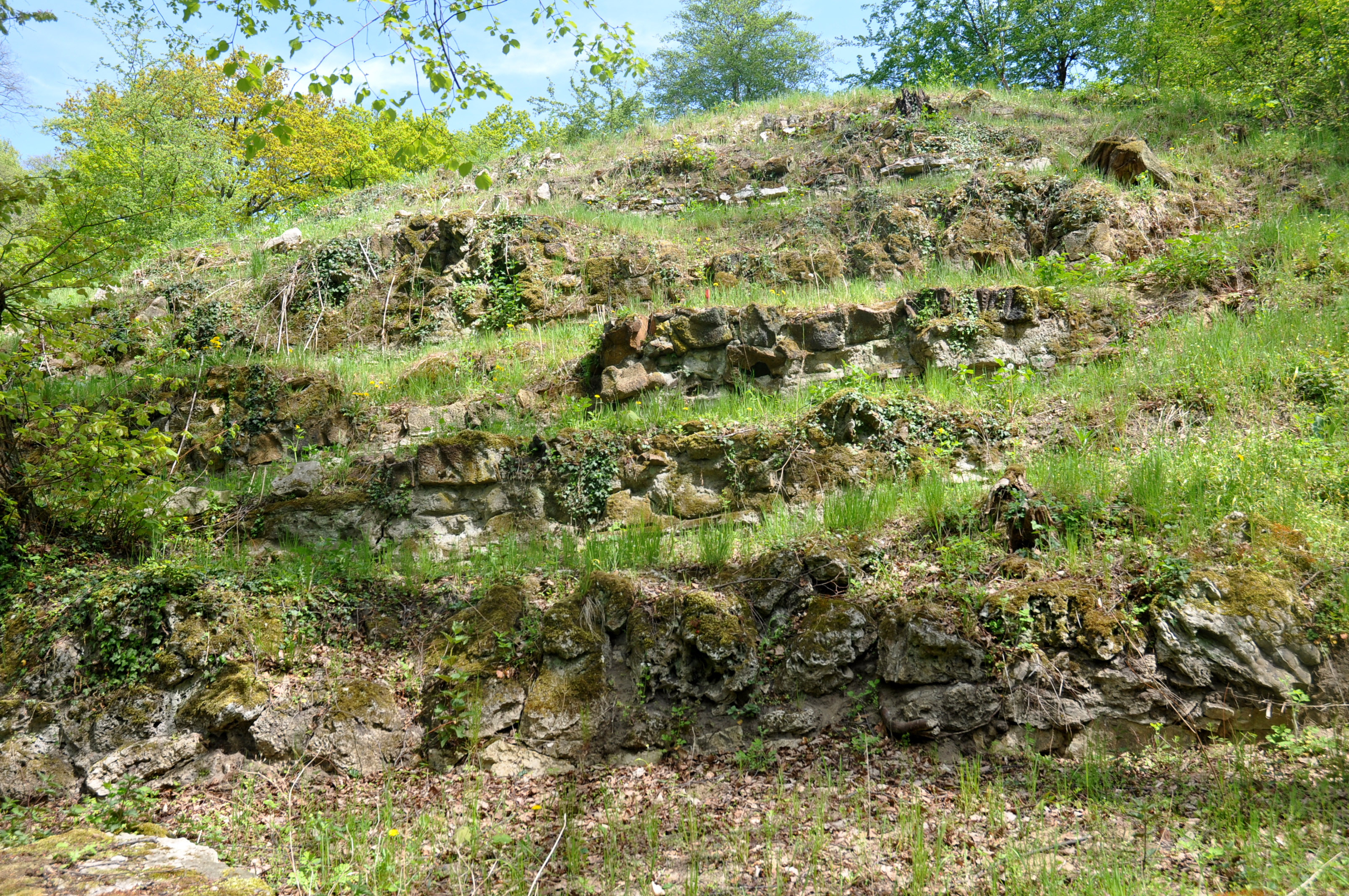 Park Klein-Glienicke, Felsenwand im Böttcherbergpark